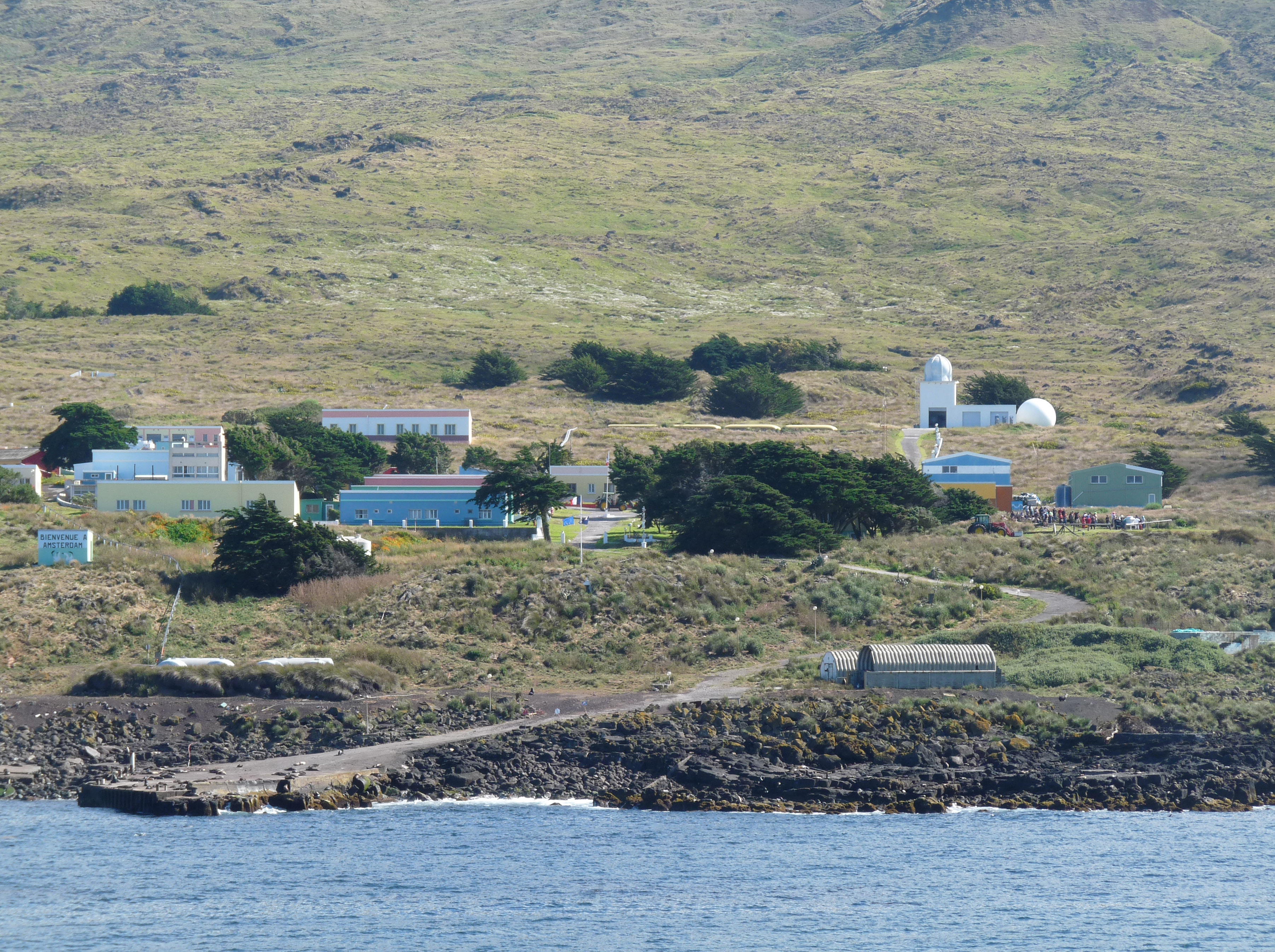 Skats uz Martēndevivjē staciju no helikoptera